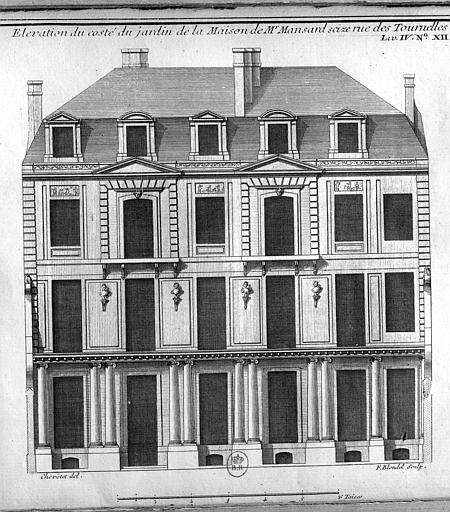 Hôtel Mansart, Paris